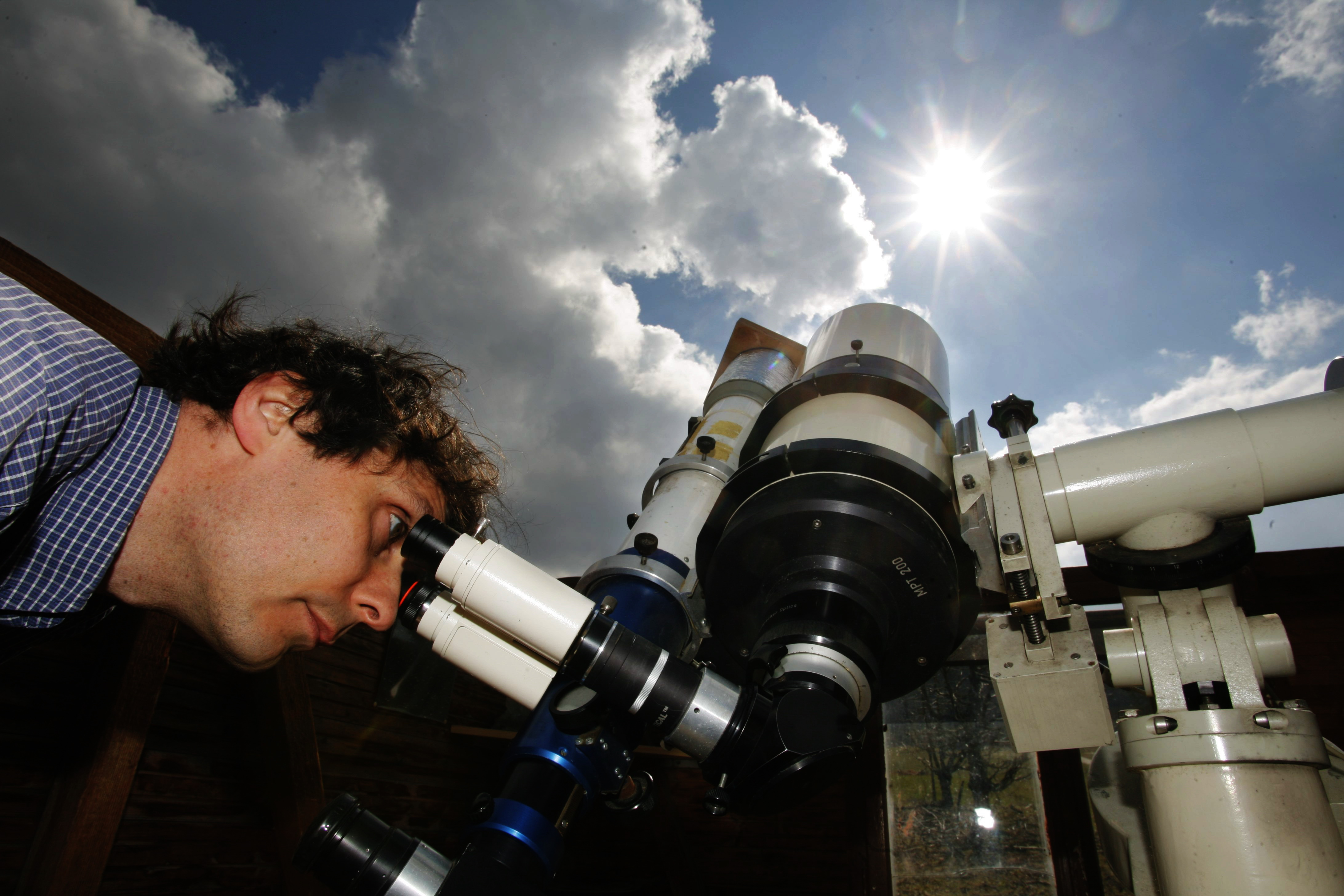 Beobachtung in der Sternwarte Oberherten am Lichtenknecker MPT200 Teleskop.